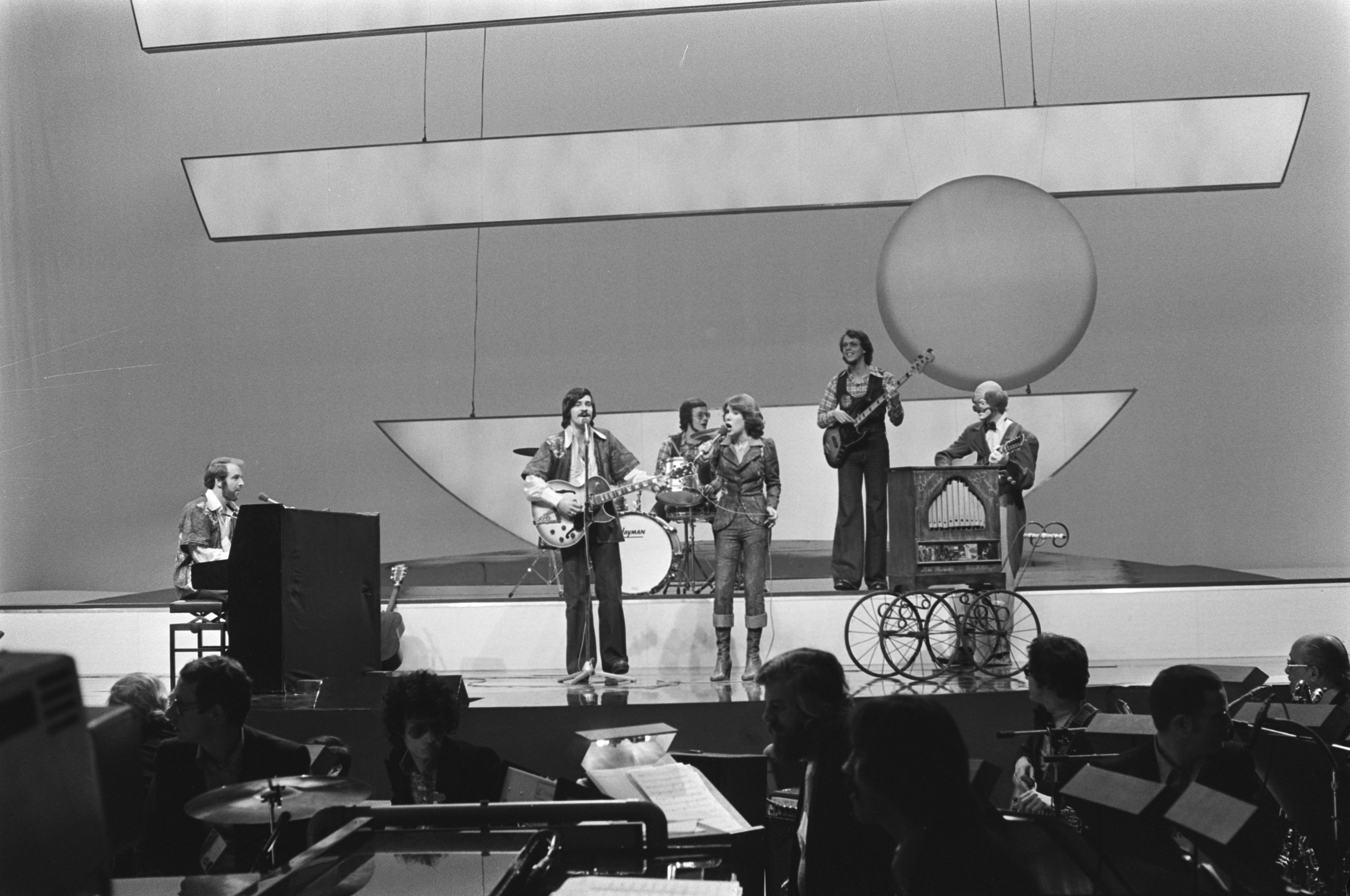 Collectie / Archief : Fotocollectie Anefo Reportage / Serie : [ onbekend ] Beschrijving : Eurovisie Songfestival 76 Den Haag ; Peter, Sue and Marc (Zwitserland) Datum : 3 april 1976 Locatie : Den Haag, Zwitserland Trefwoorden : songfestivals Persoonsnaam : Eurovisie Songfestival, PETER Fotograaf : Mieremet, Rob / Anefo Auteursrechthebbende : Nationaal Archief Materiaalsoort : Negatief (zwart/wit) Nummer archiefinventaris : bekijk toegang 2.24.01.05 Bestanddeelnummer : 928-5029